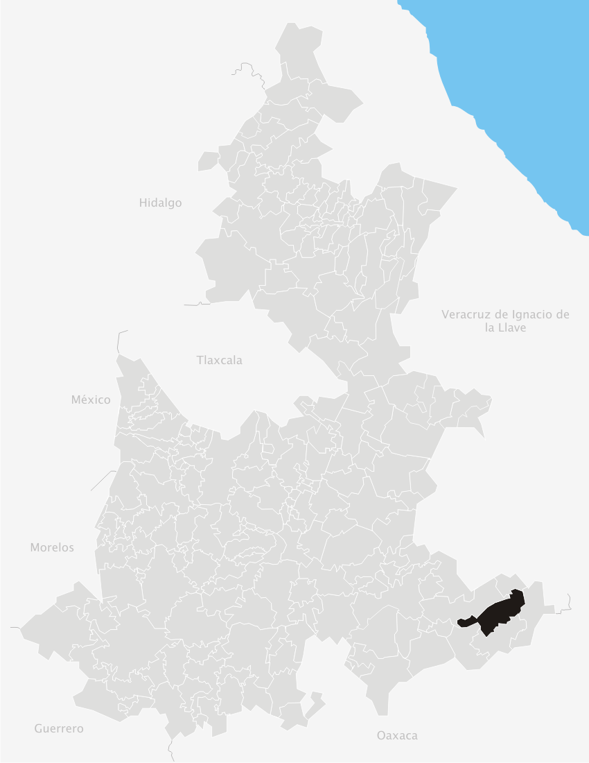 Localización del municipio de Zoquitlán, en el estado de Puebla (México)